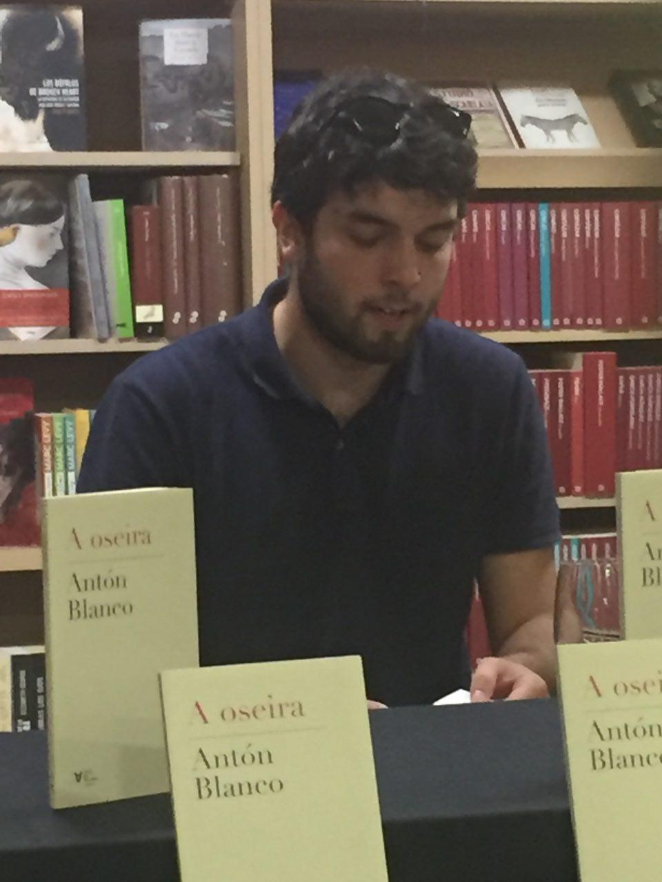 Antón Blanco Casás na presentación de A oseira en Ourense 7-7-2016